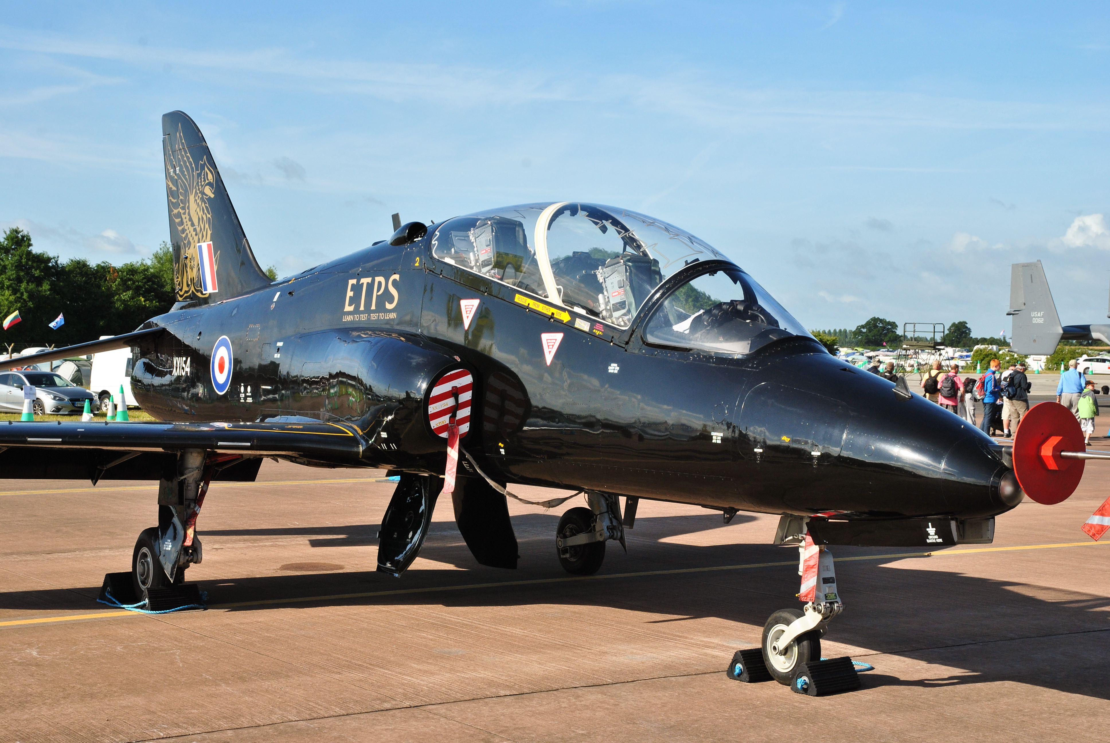 Hawk T1 - ETPS